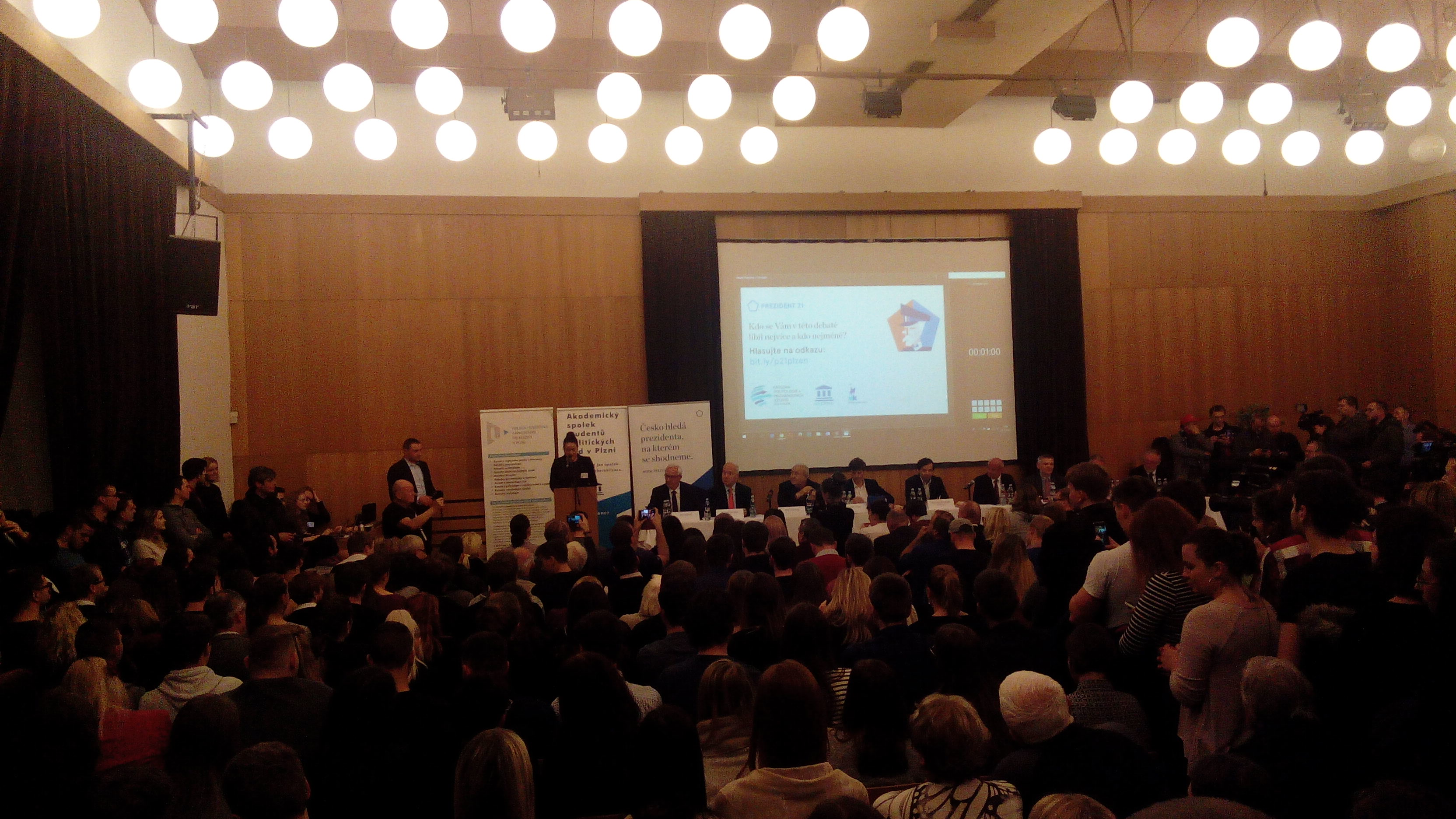 Debata prezidentských kandidátů 2017 v Plzni na Filozofické fakultě.